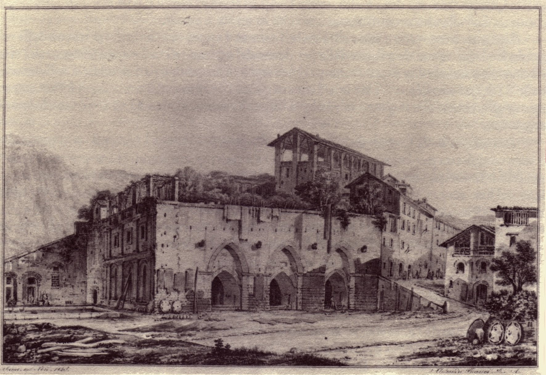 Fontebranda, 1845, disegno. Siena, Biblioteca Comunale degli Intronati, Ms. E 4. 11, Il Taccuino senese di Alessandro Romani.